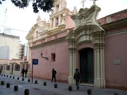 Fachada del Museo de Arte religioso Juan de Tejeda, Córdoba, Argentina.